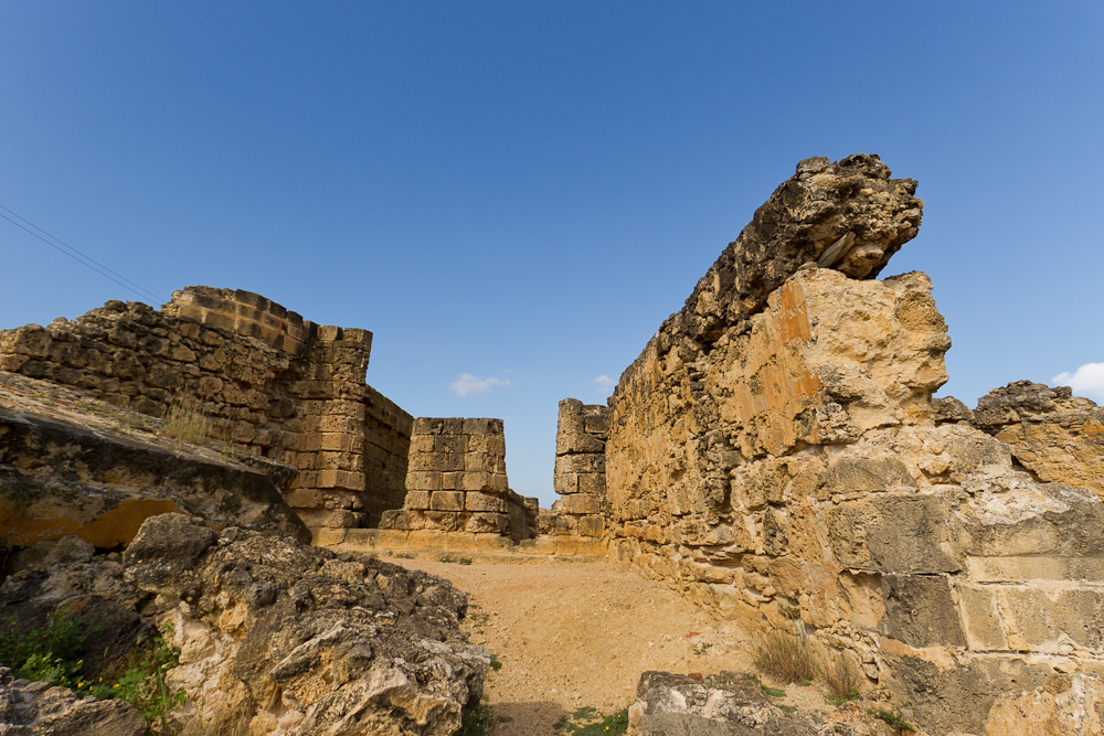 En 1625 se contruyó la real fuerza de Santiago de Arroyo de Araya, que fue la primera y más importante fortaleza de las provincias de Venezuela. El Castillo de Araya como se conoce actualmente fue declarado monumento histórico nacional en 1960.